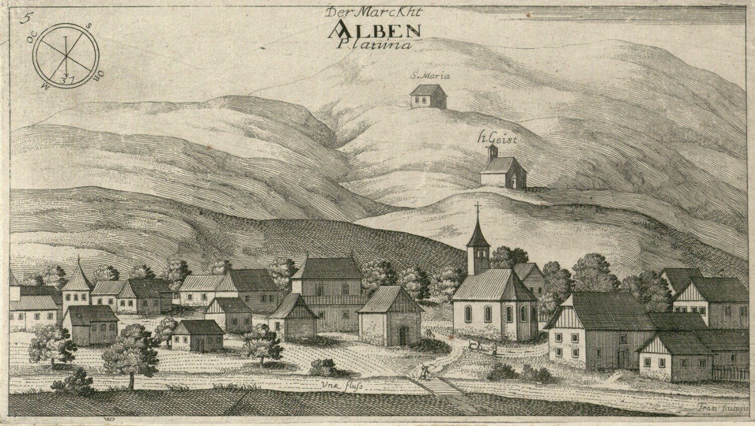 Planina (Alben)